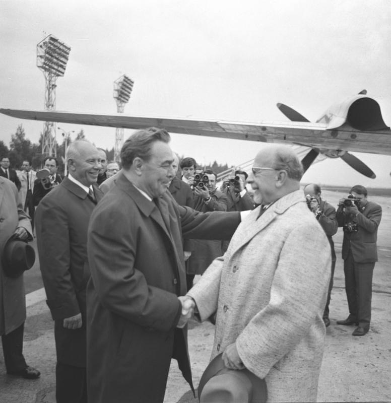 Zentralbild/Koard 3.6.1969 Moskau: Delegation der SED eingetroffen Zur Teilnahme an der internationalen Beratung der kommunistischen und Arbeiterparteien, die am 5.6.1969 in Moskau beginnt, traf die Delegation der SED unter Leitung des Ersten Sekretärs des ZK der SED und Vorsitzenden des Staatsrates der DDR , Walter Ulbricht (r.), in der sowjetischen Hauptstadt ein. Die Delegation wurde auf dem Flughafen Wnukowo 2 vom Generalsekretär des ZK der KPdSU, Leonid Breshnew (M.) und vom Mitglied des Politbüros des ZK der KPdSU und Vorsitzenden des Präsidiums des Obersten Sowjets der UdSSR Nikolai Podgorny (l.) herzlich begrüßt.